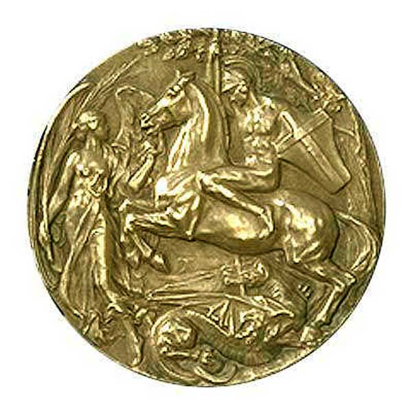 Оборотная сторона золотой медали Игр XXIX Олимпиады (в Лондоне)